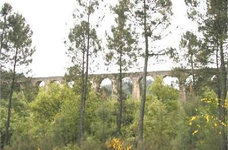 Le viaduc du Doulovy, à Banne, Ardèche. Ancien viaduc de la ligne de chemin de fer minière. Photographie Marc BLACHERE prise en juin 2005